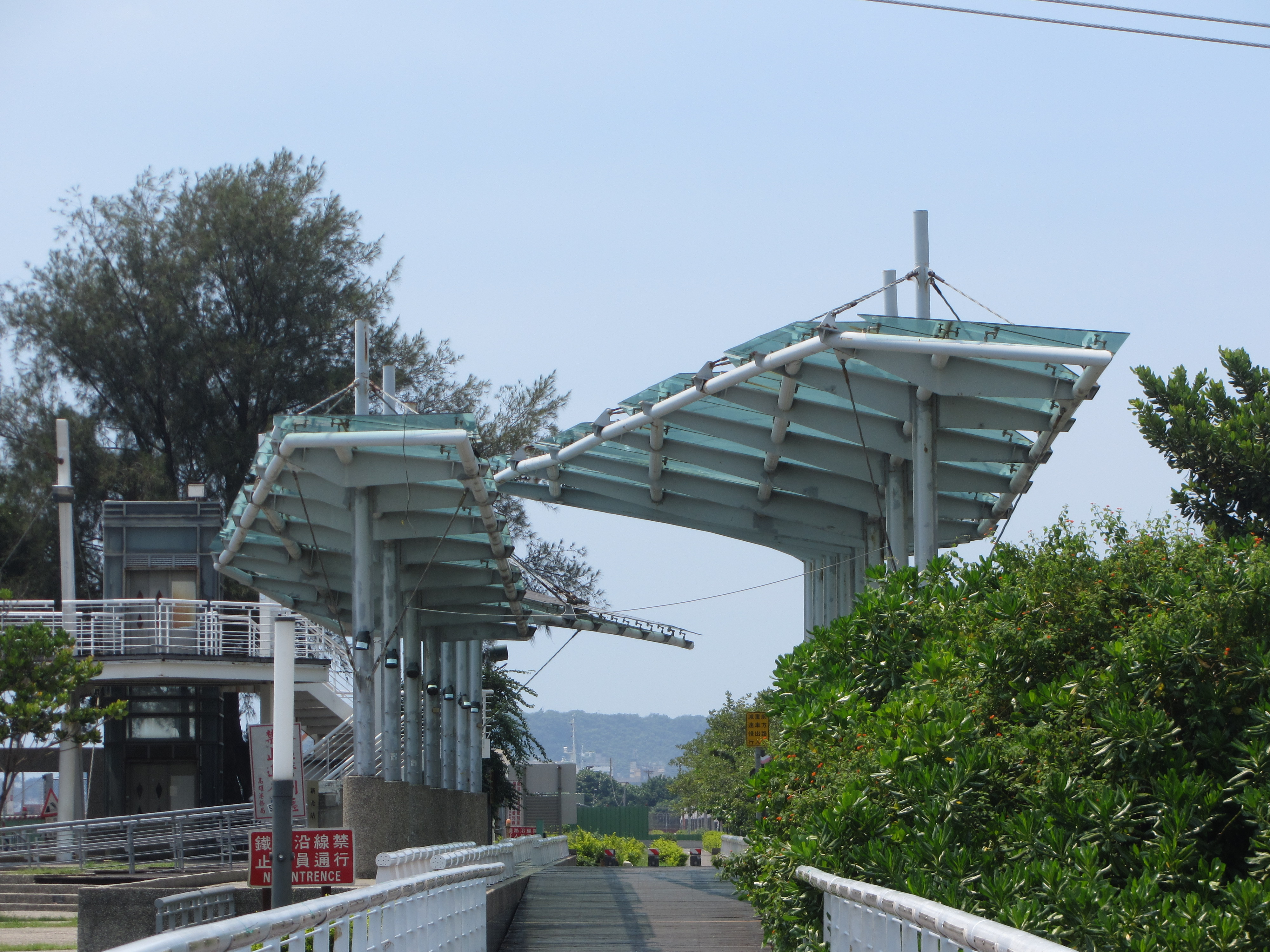 在新光碼頭內的新光車站